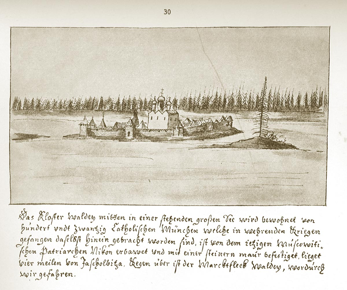 Иверский (Валдайский) монастырь